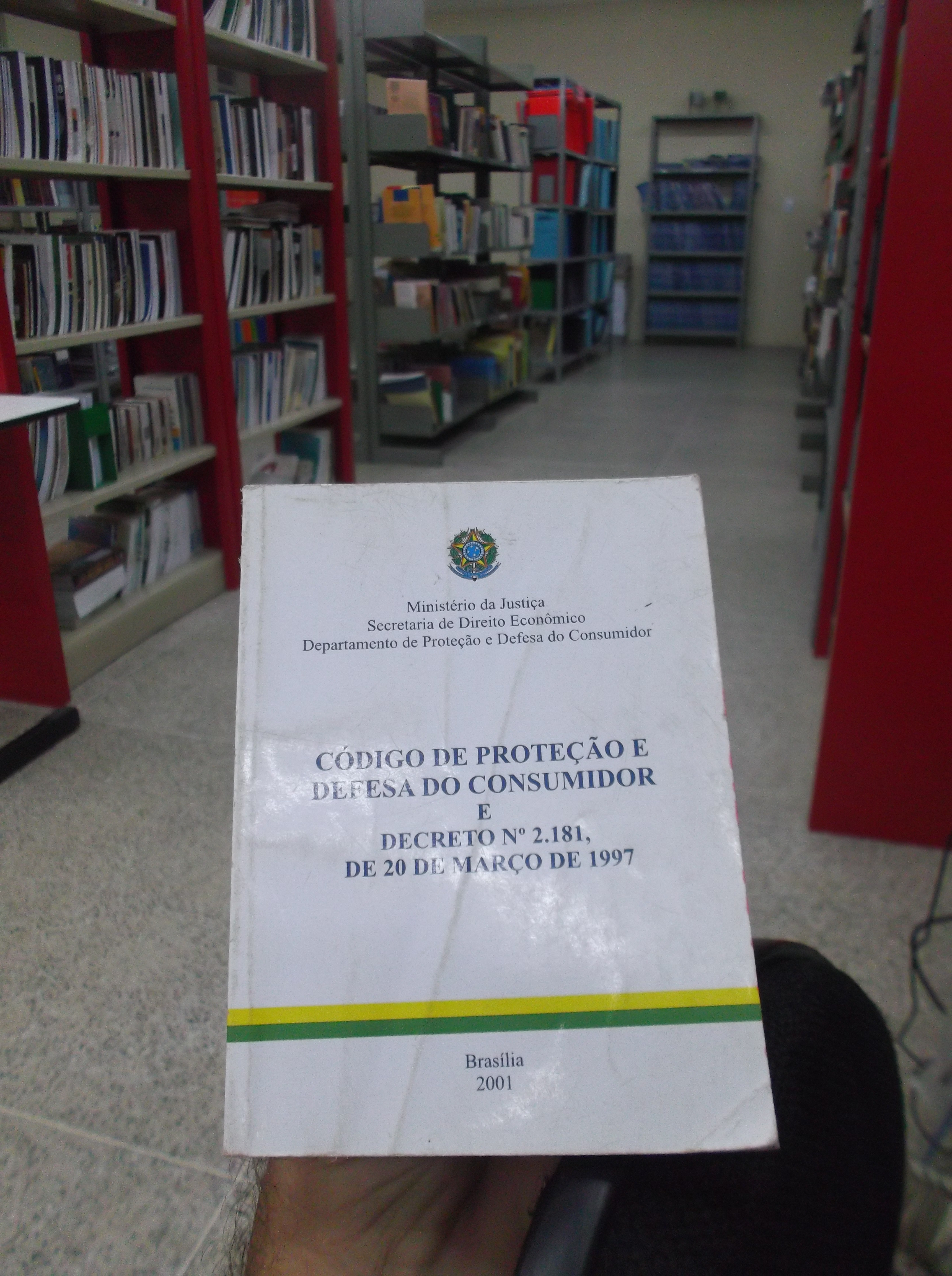 Código de Proteção e Defesa do Consumidor do Brasil. O mesmo que Lei Nº 8.078, de 11 de setembro de 1990.